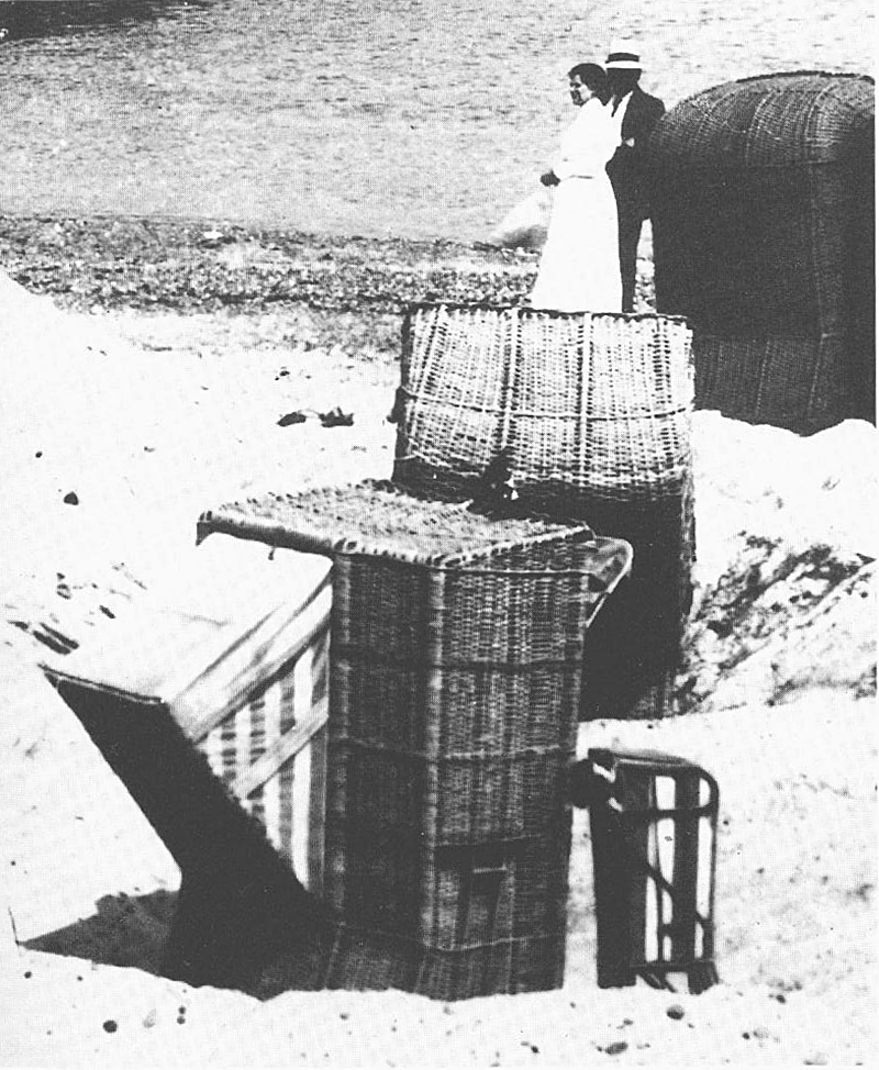 klappstrandkorb